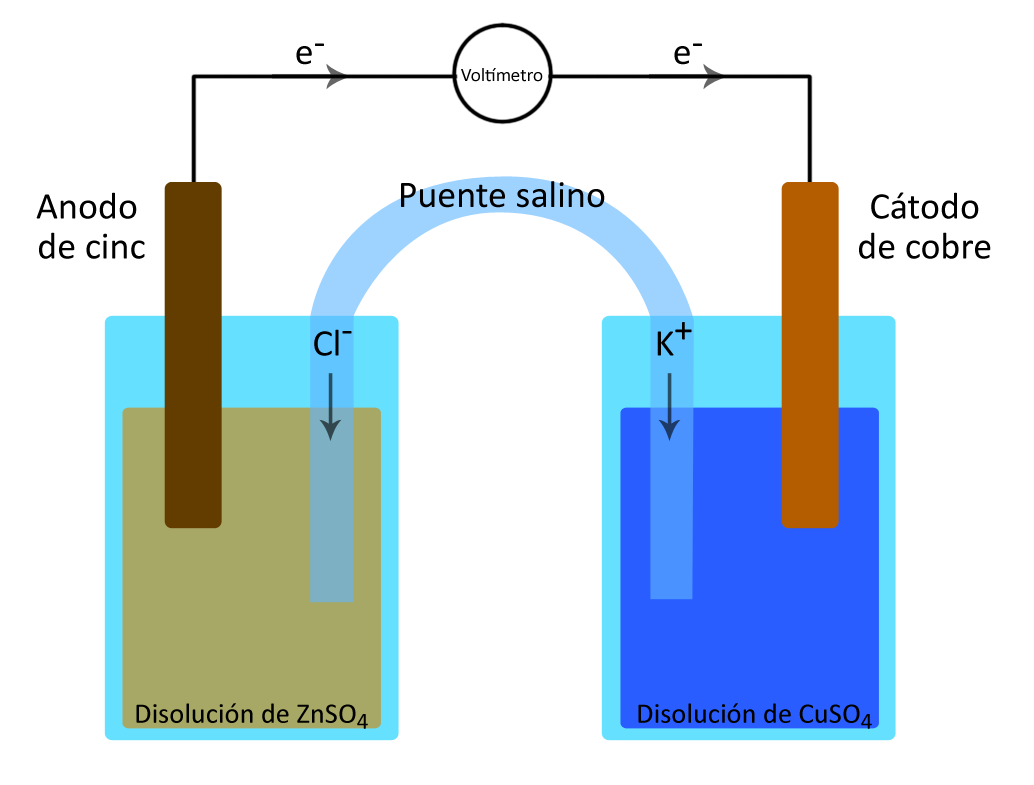 Un esquema de la pila de Daniell